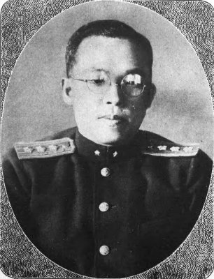 山内継喜（1897-1973）